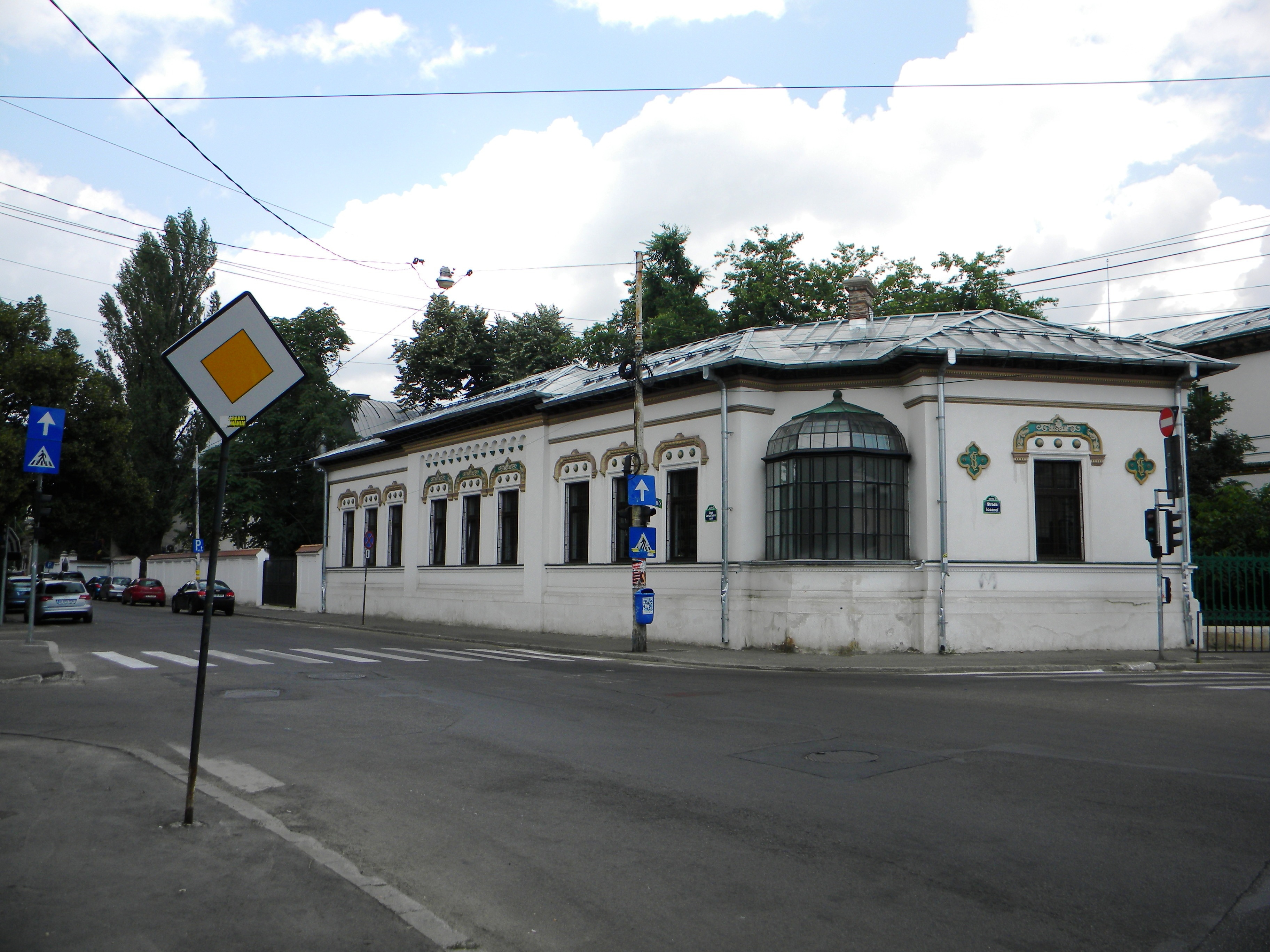 Scoala Centrala de Fete, Str. Icoanei, Bucuresti sect. 2